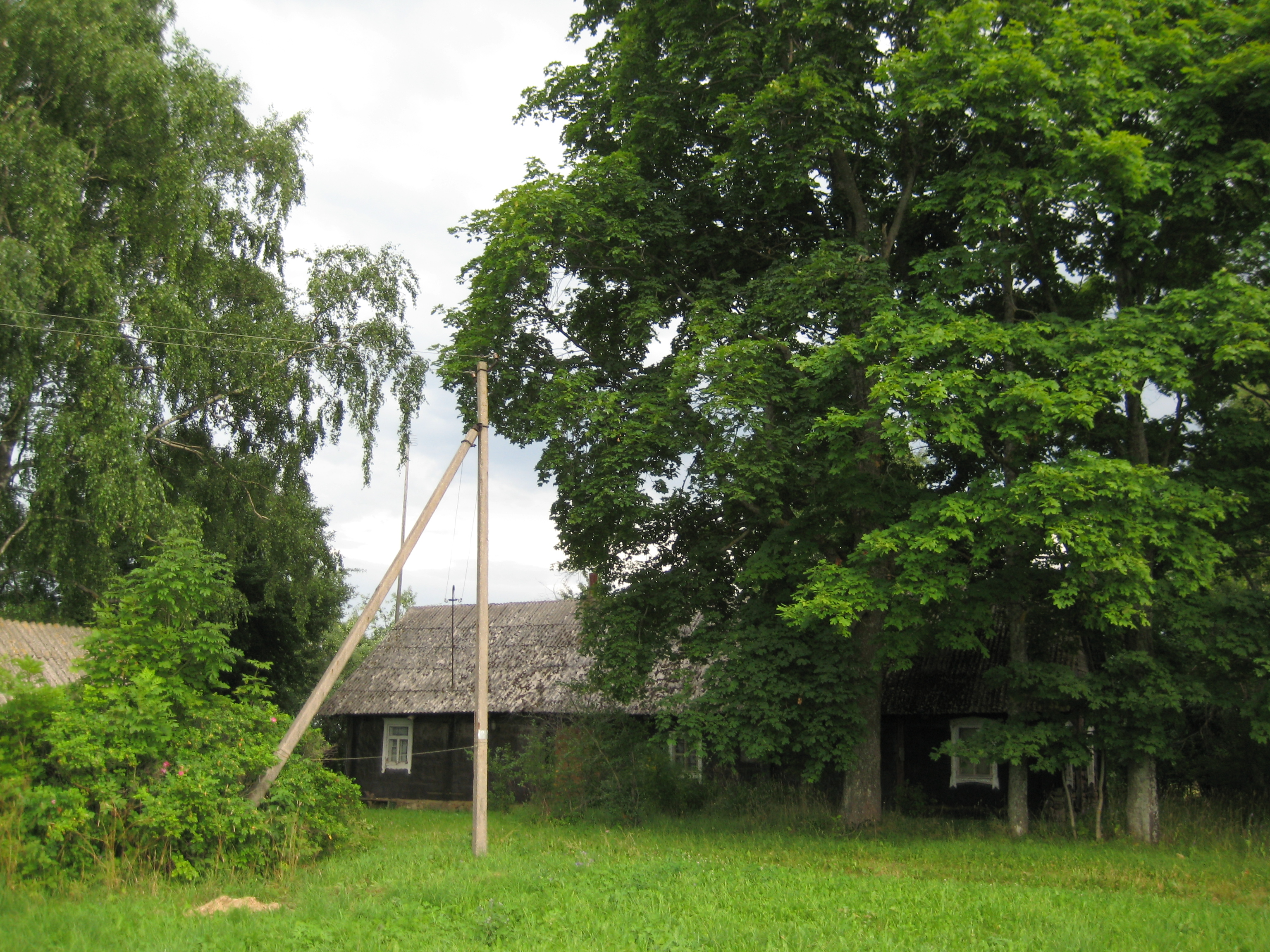 Vyžuonų sen., Lithuania